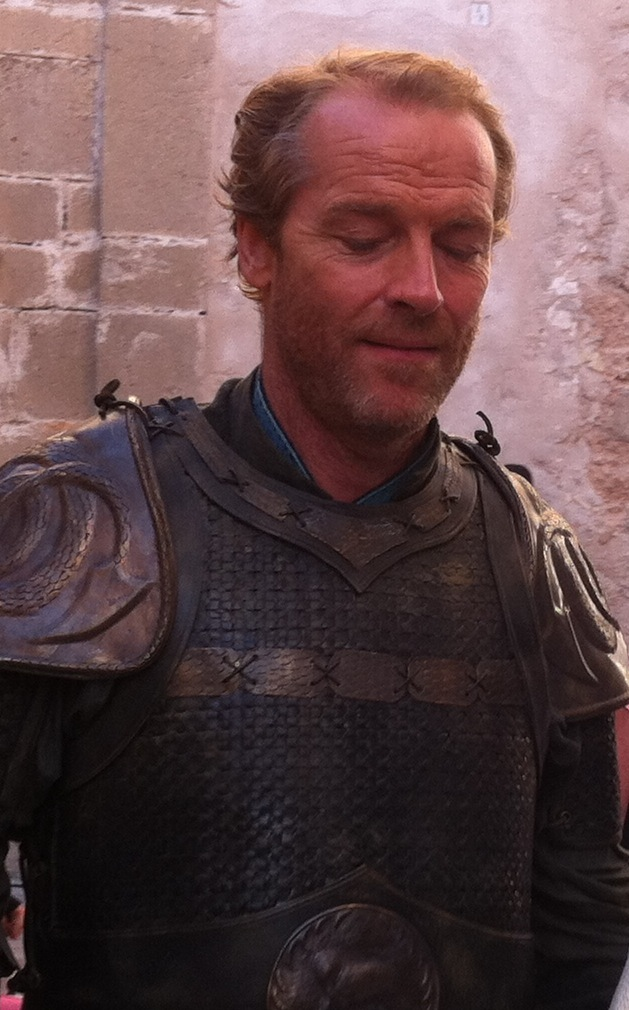 In Essaouira, filming Game of Thrones